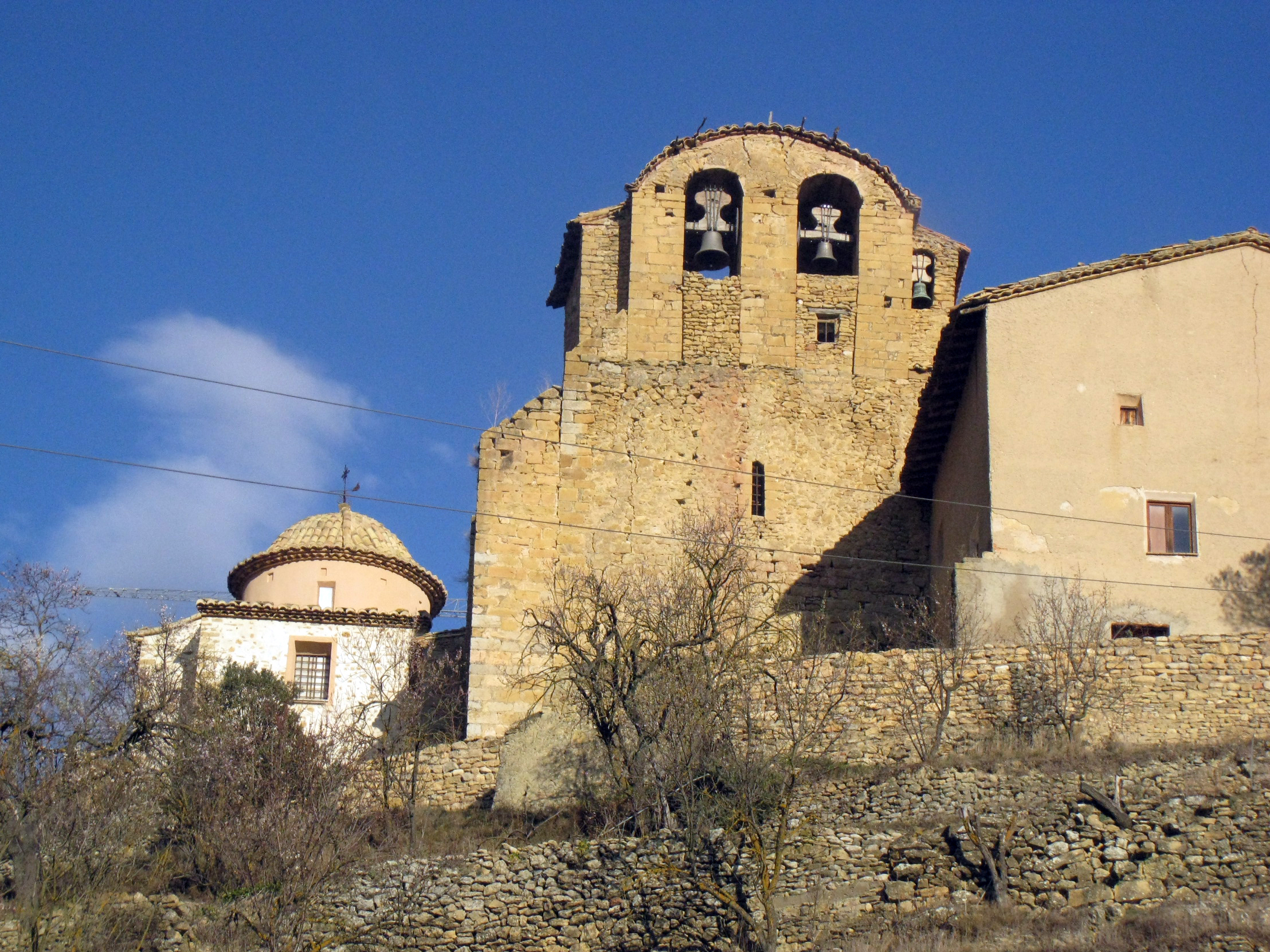 Església parroquial de Sant Bartomeu (la Todolella) 01.112-001.